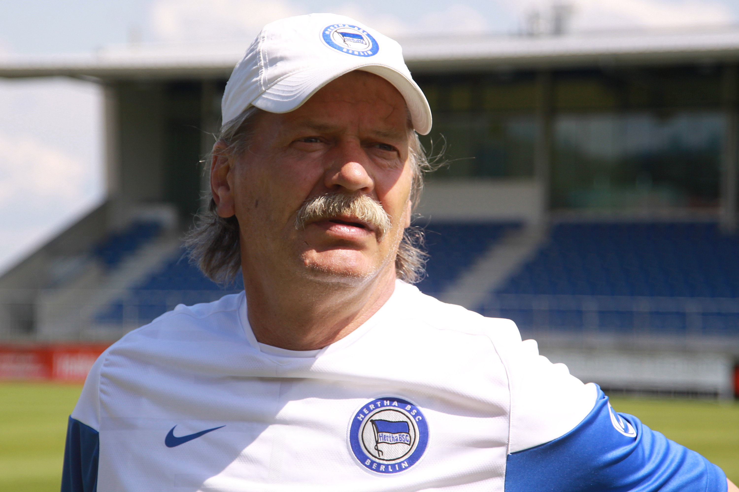 Enver Maric – Tormanntrainer Hertha BSC Berlin (1)